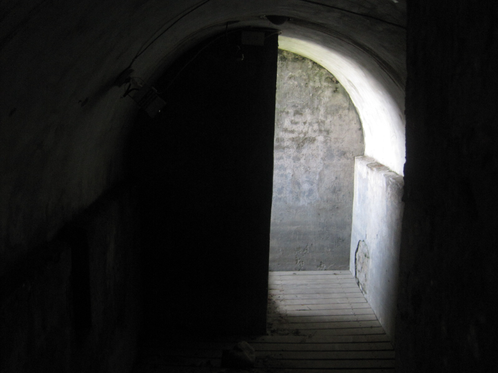 臺南運河博物館防空洞內部。